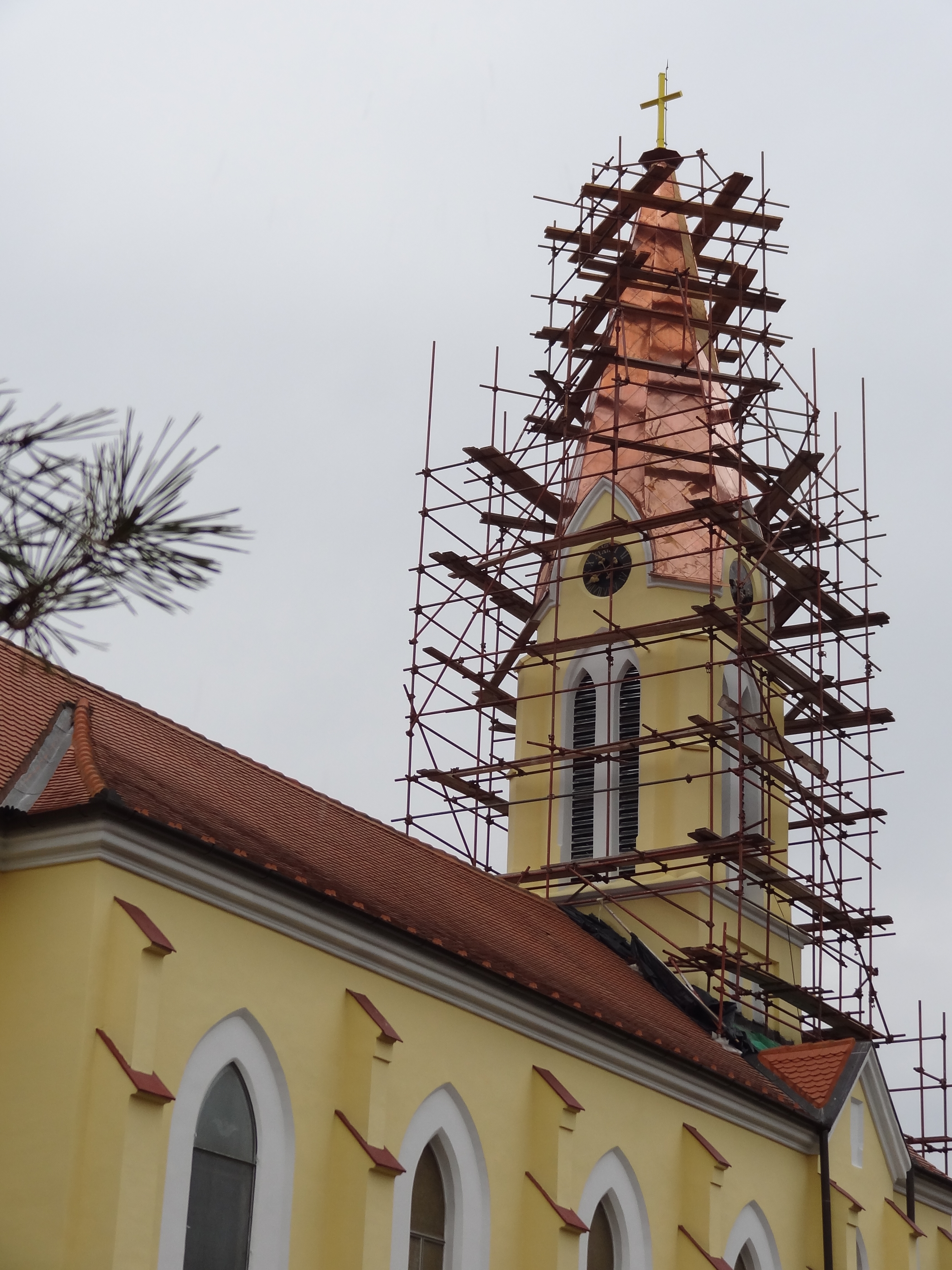 Urmenyhaza Templom